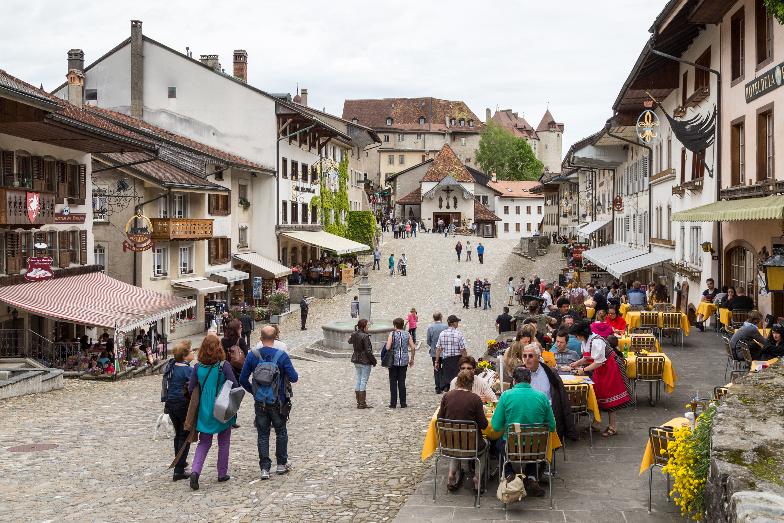 Rue du Bourg, Gruyères (2014)